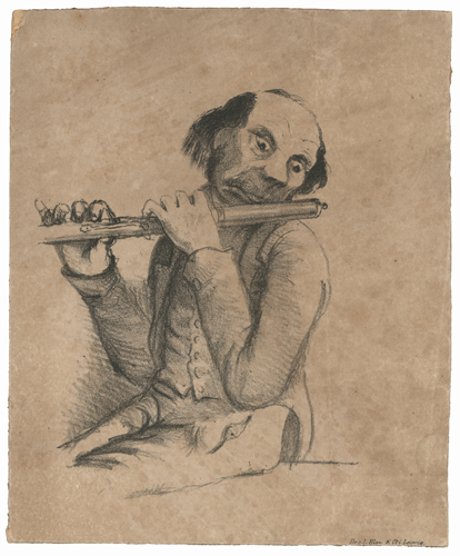 C. Reimers: Das Leipziger Gewandhausorchester im Lichte der Satire, 19 Karikaturen, lithographiert von Blau & Co., Leipzig um 1850 Carl Augustin Grenser (1794-1864), Flötist und Autor